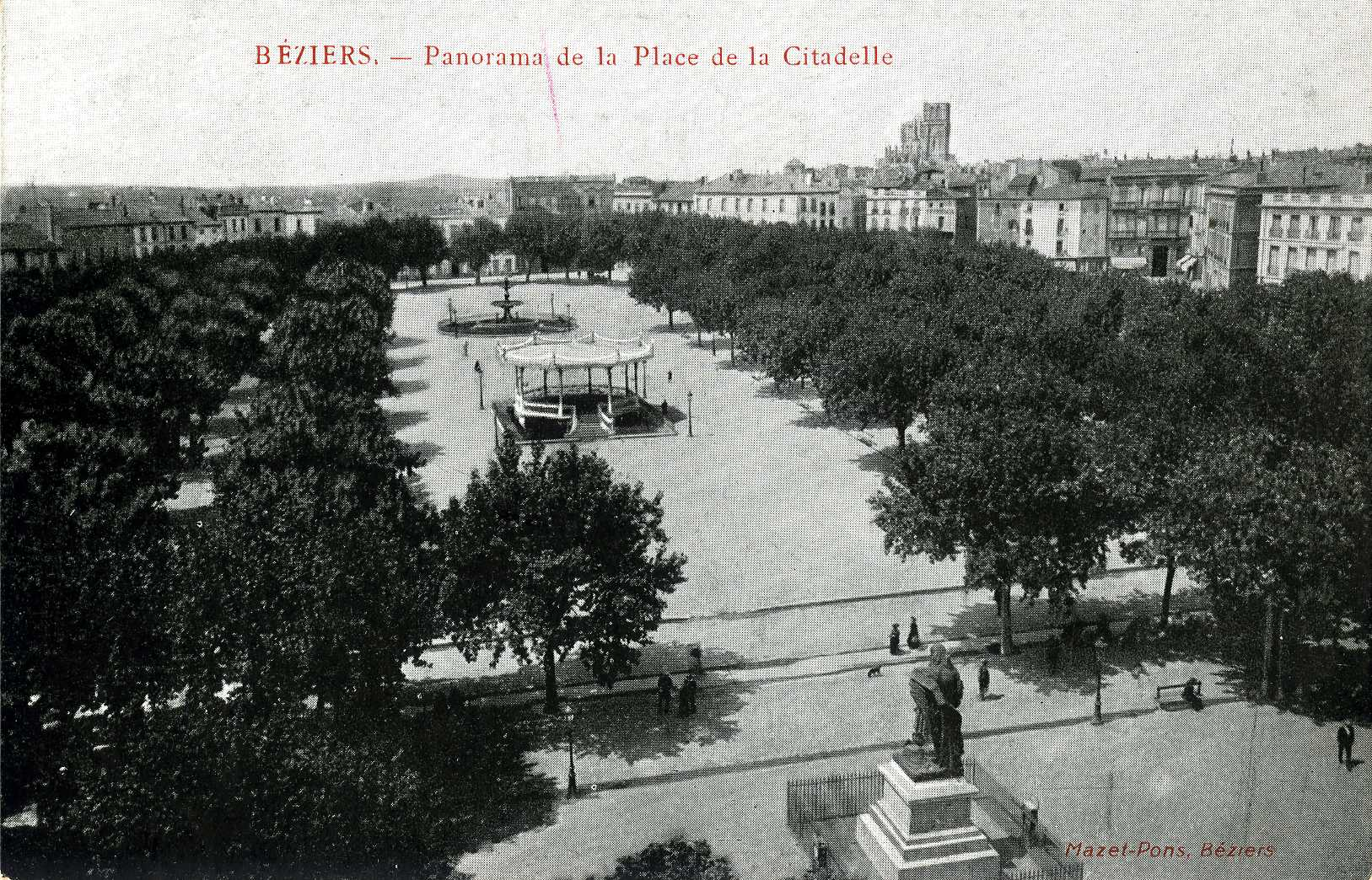 Béziers, Place-de-la-Citadelle avec le Kiosque à musique au premier plan, lieu de concerts et ancien marché aux bestiaux.